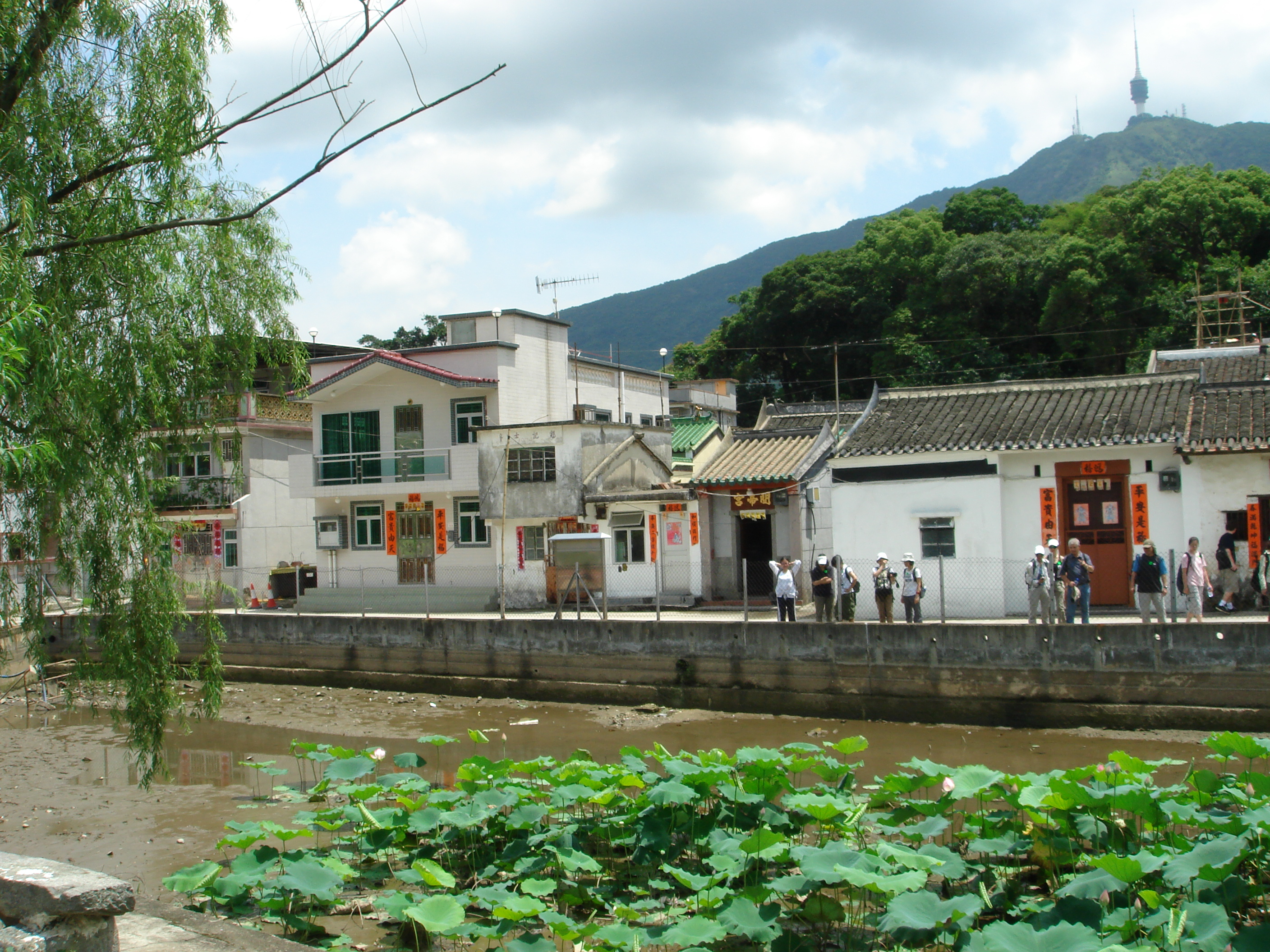 中文（香港）: 蓮麻坑建築群。